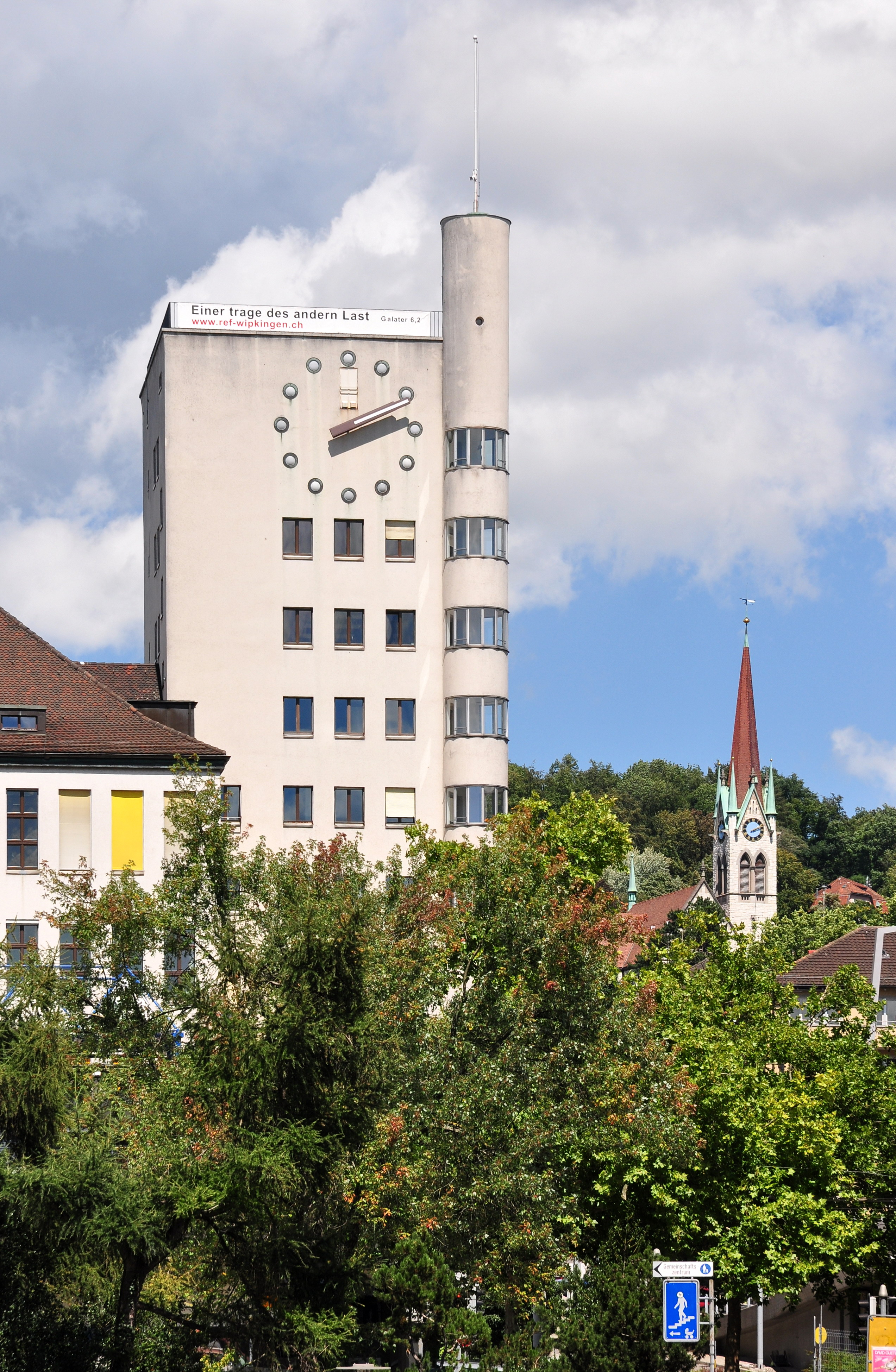 Kirchgemeindehaus in Zürich-Wipkingen (Switzerland)